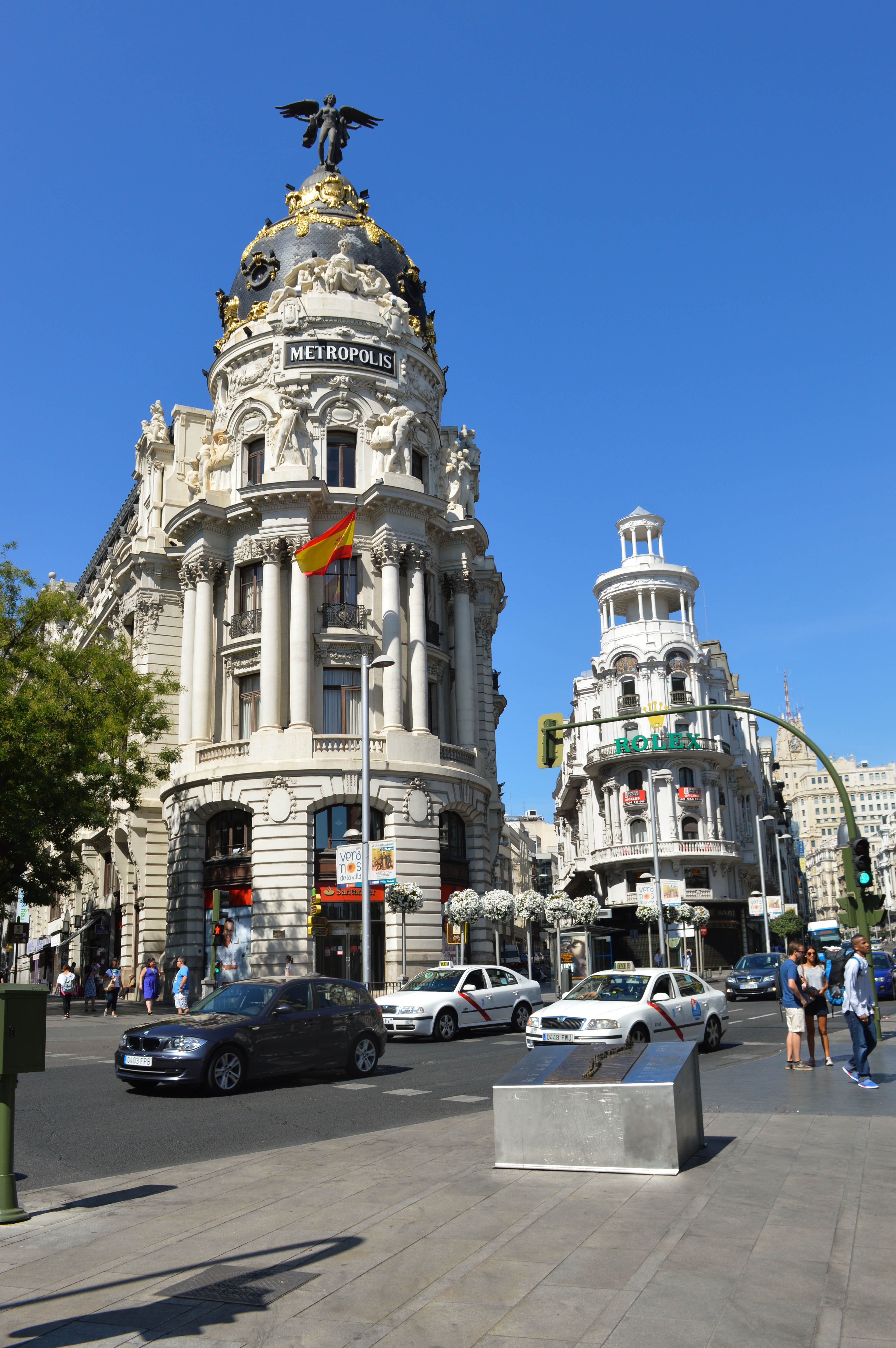 Metropolis